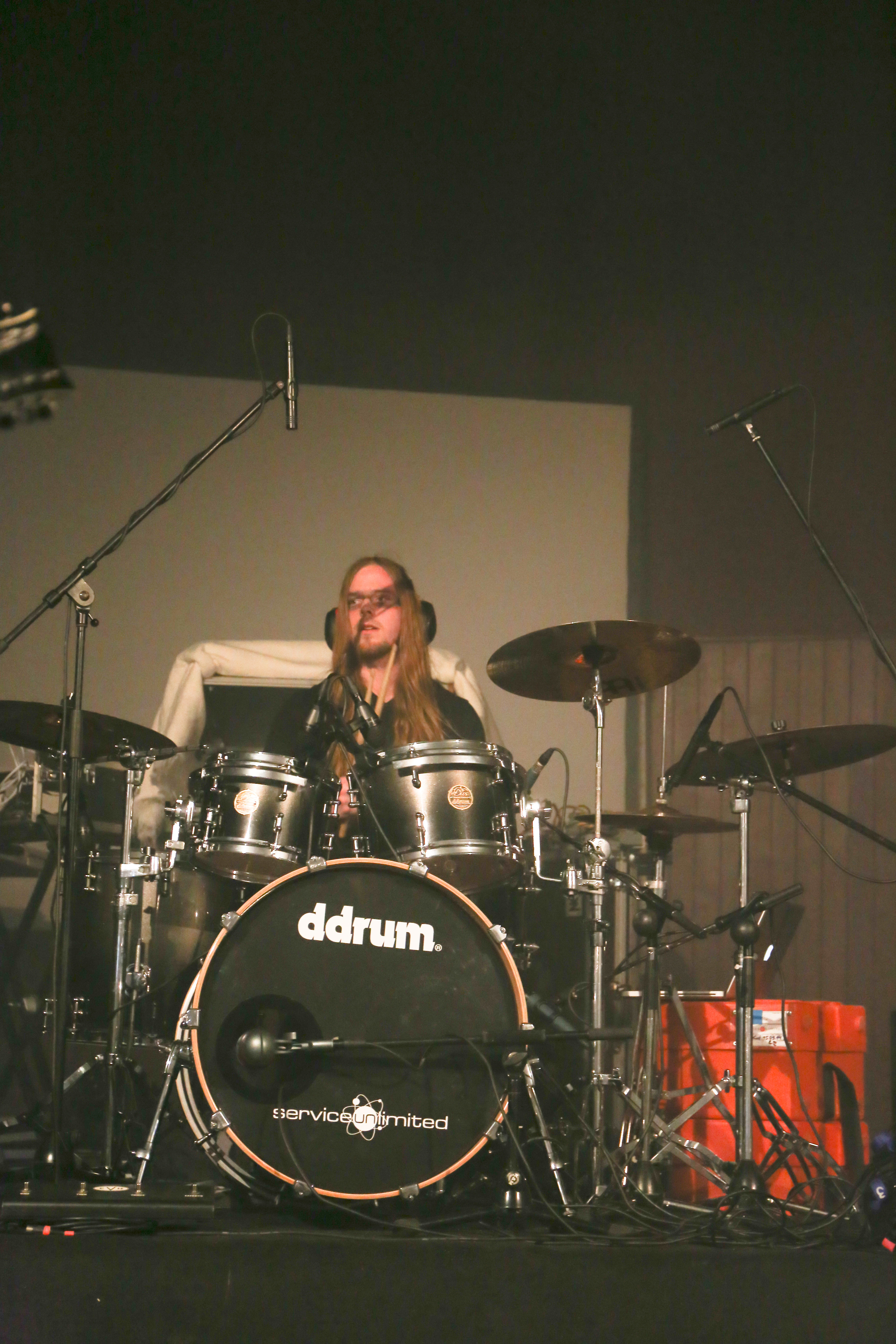 The Angina Pectoris auf dem Wave-Gotik-Treffen 2016 im Felsenkeller.